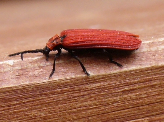 Dictyoptera aurora